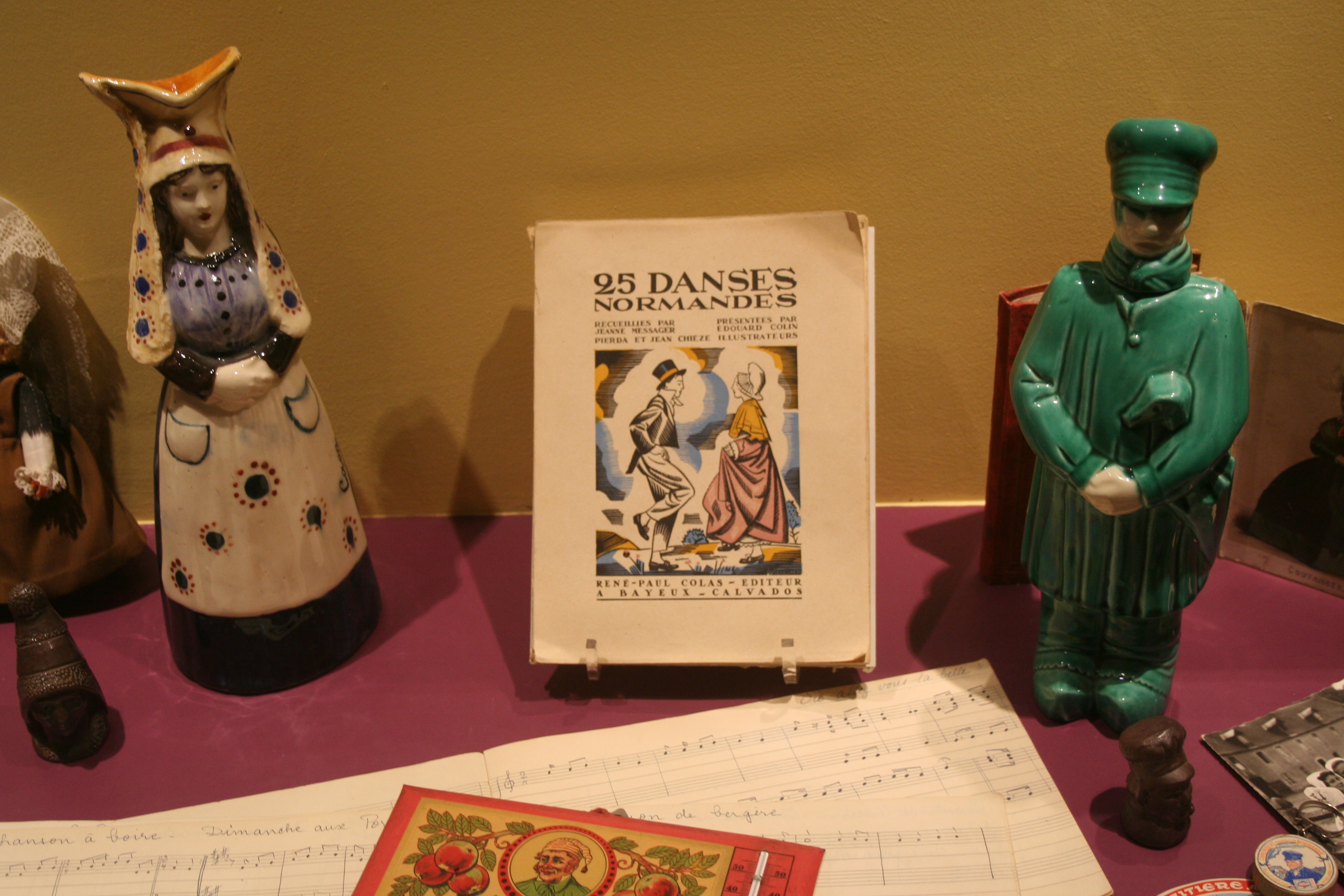 statuettes folkloriques, musée de Normandie, Caen